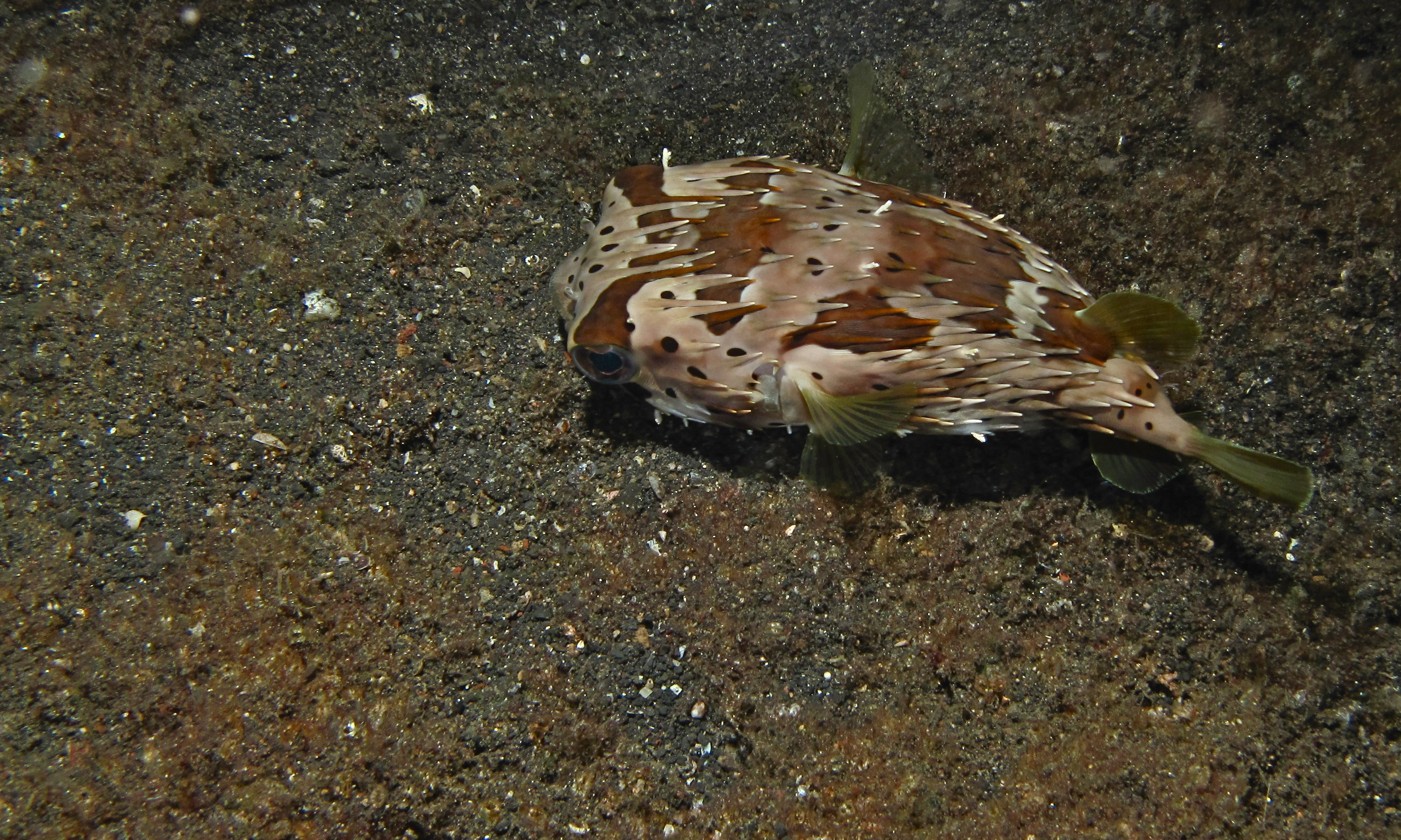 Jahir, Lembeh Strait, Sulawesi, INDONESIA